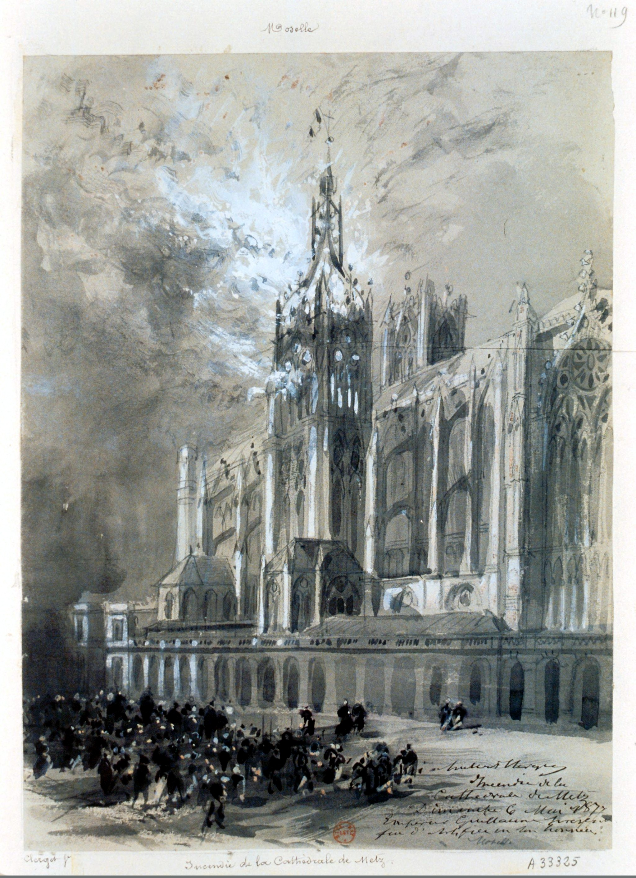 Incendie de la Cathedrale de Metz. Dimanche 6 mai 1877. Empereur Guillaume présent. Feu d'artifice en son honneur : dessin